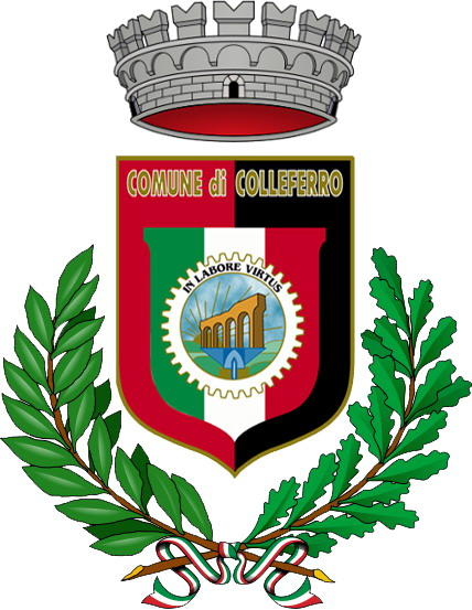 cambiata la corona da comune a città